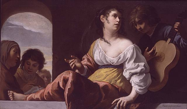 Muzikaal gezelschap aan een balustrade.label QS:Lnl,"Muzikaal gezelschap aan een balustrade."